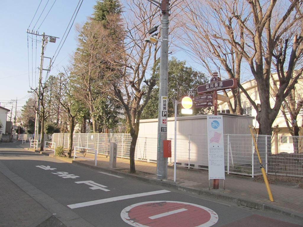 品川街道。東京都府中市。